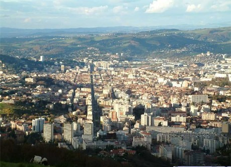 Vue générale de Saint-Etienne ( avec l'aimable autorisation de ) Licensing Catégorie:Image de Saint-Étienne